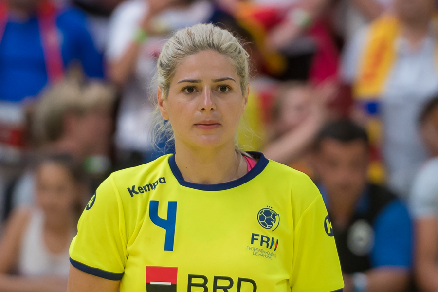 Damenhandball WM-Qualifikation Playoff Österreich vs Rumänien am 13. Juni 2017 in Stockerau. Bild zeigt Elena Nicoleta Dinca (ROU).